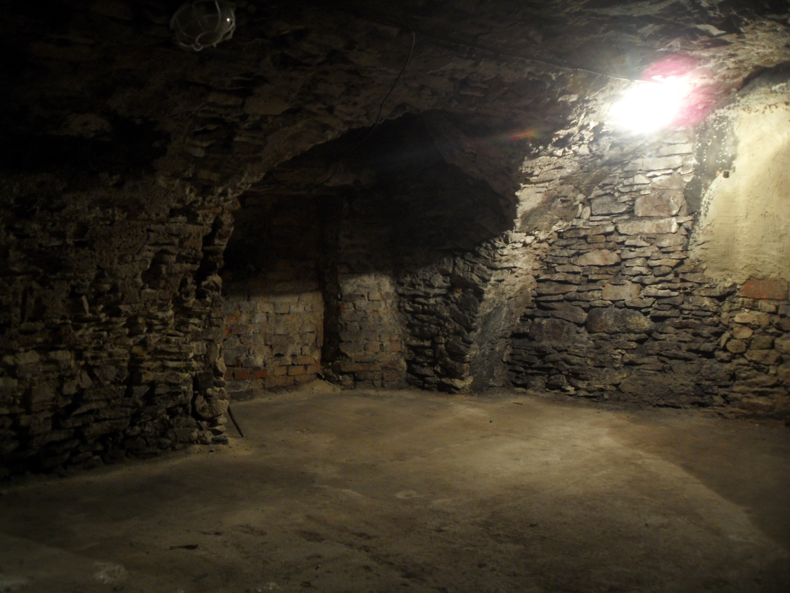 Gotické sklepy a základy